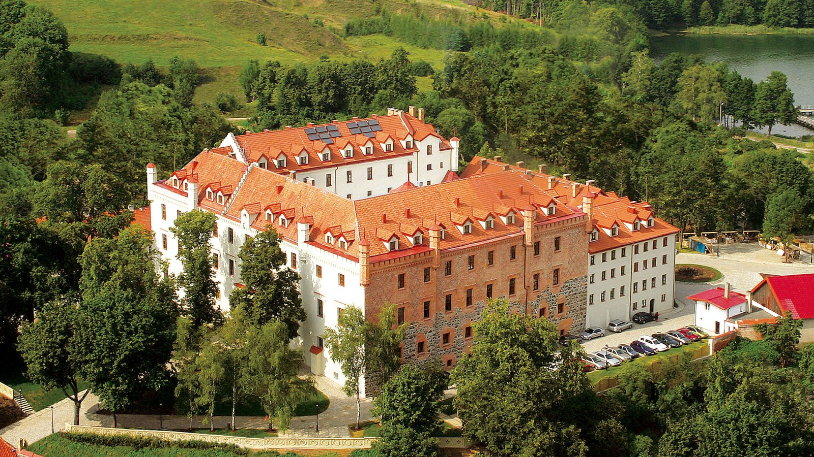 Zamek w Rynie z lotu ptaka